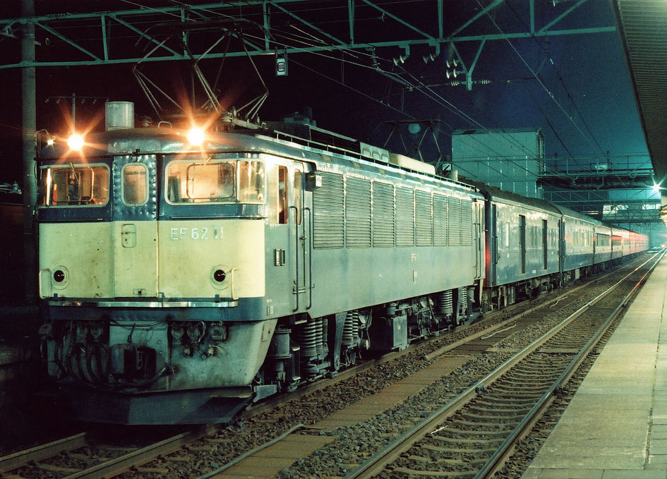 国鉄EF62 11けん引 606列車 急行「越前」